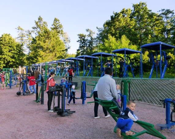 Спортивные тренажёры на набережной Онежского озера в Петрозаводске.